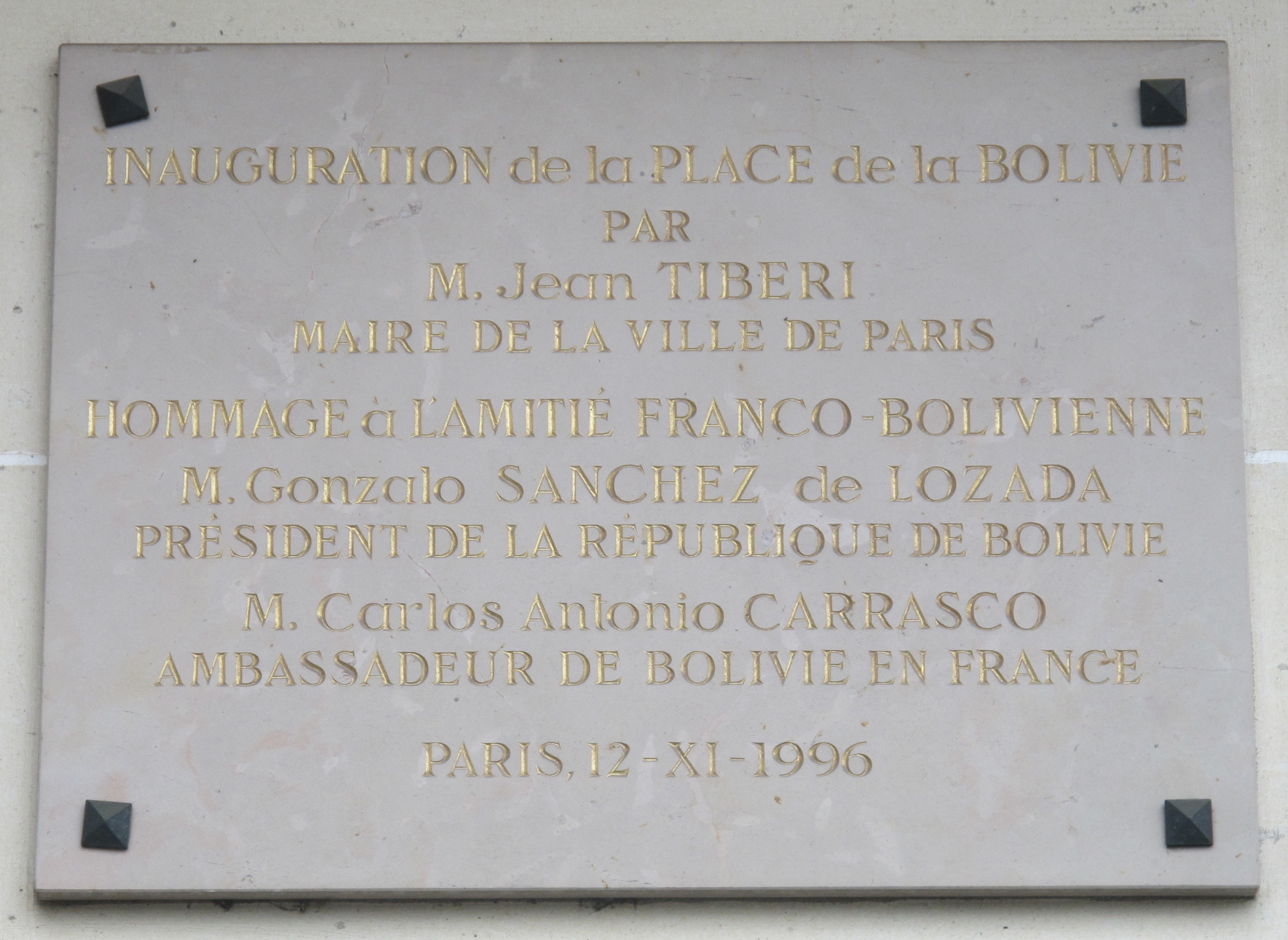 Plaque place de Bolivie (Paris, 16e), 2 rue d'Ankara. "Inauguration de la place de la Bolivie par M. Jean Tibéri, maire de la ville de Paris. Hommage à l'amitié franco-bolivienne. M. Gonzalo Sanchez de Lozada, président de la République de Bolivie. M. Carlos Antonio Carrasco, ambassadeur de Bolivie en France. Paris 12 - XI - 1996".